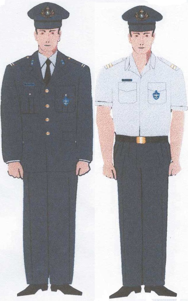 Στολή Υπαλλήλου της Ελληνικής Τελωνειακής Υπηρεσίας